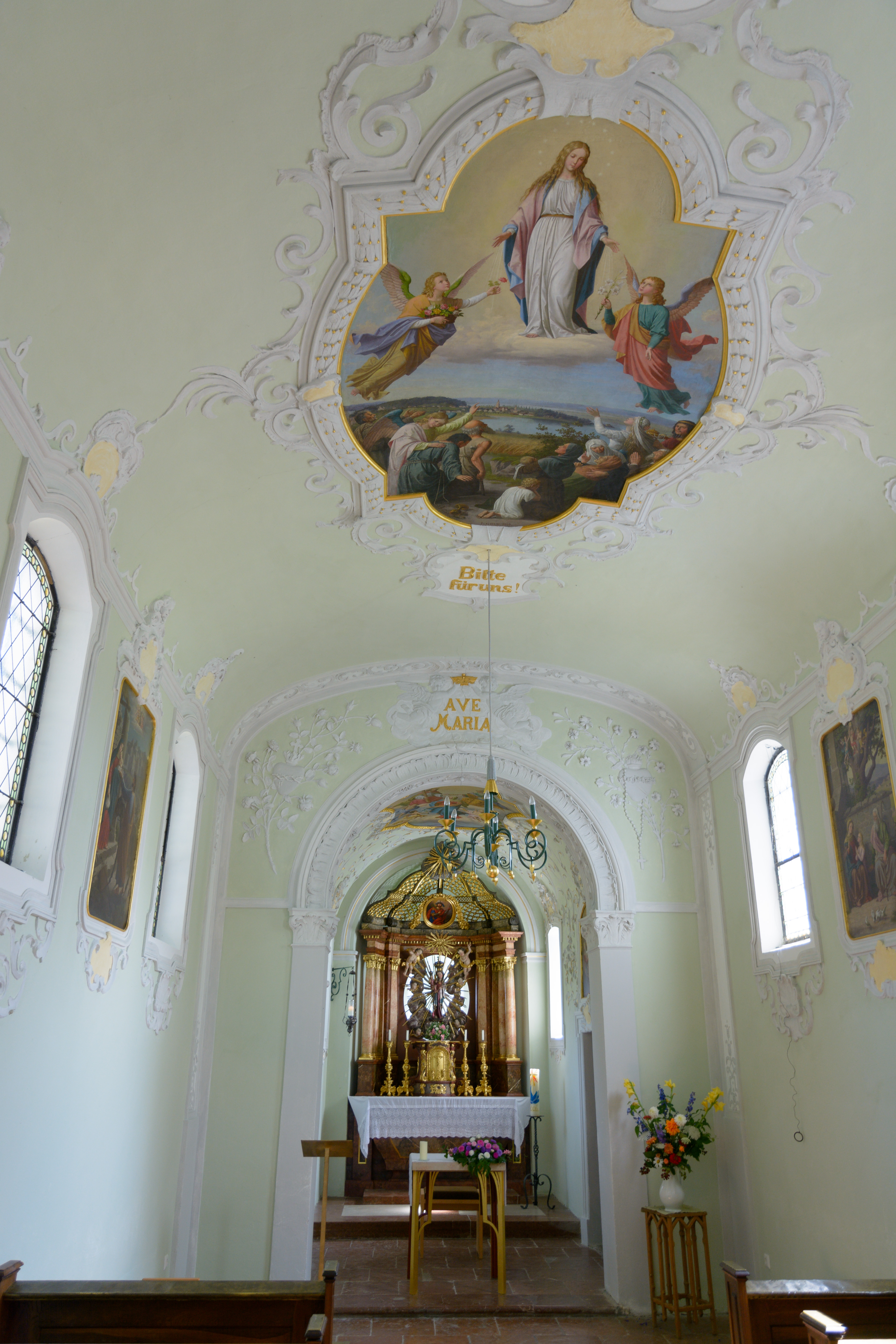 Zellhof Kapelle Innen